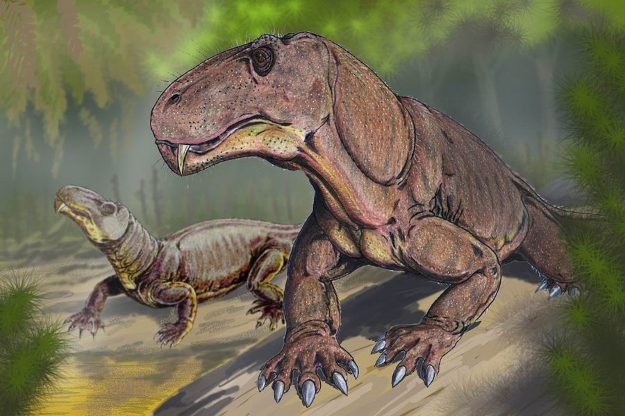 Ο τιτανοφονεύς.